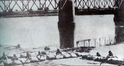 江桥抗战，拍摄于1931年11月，已过保护期。